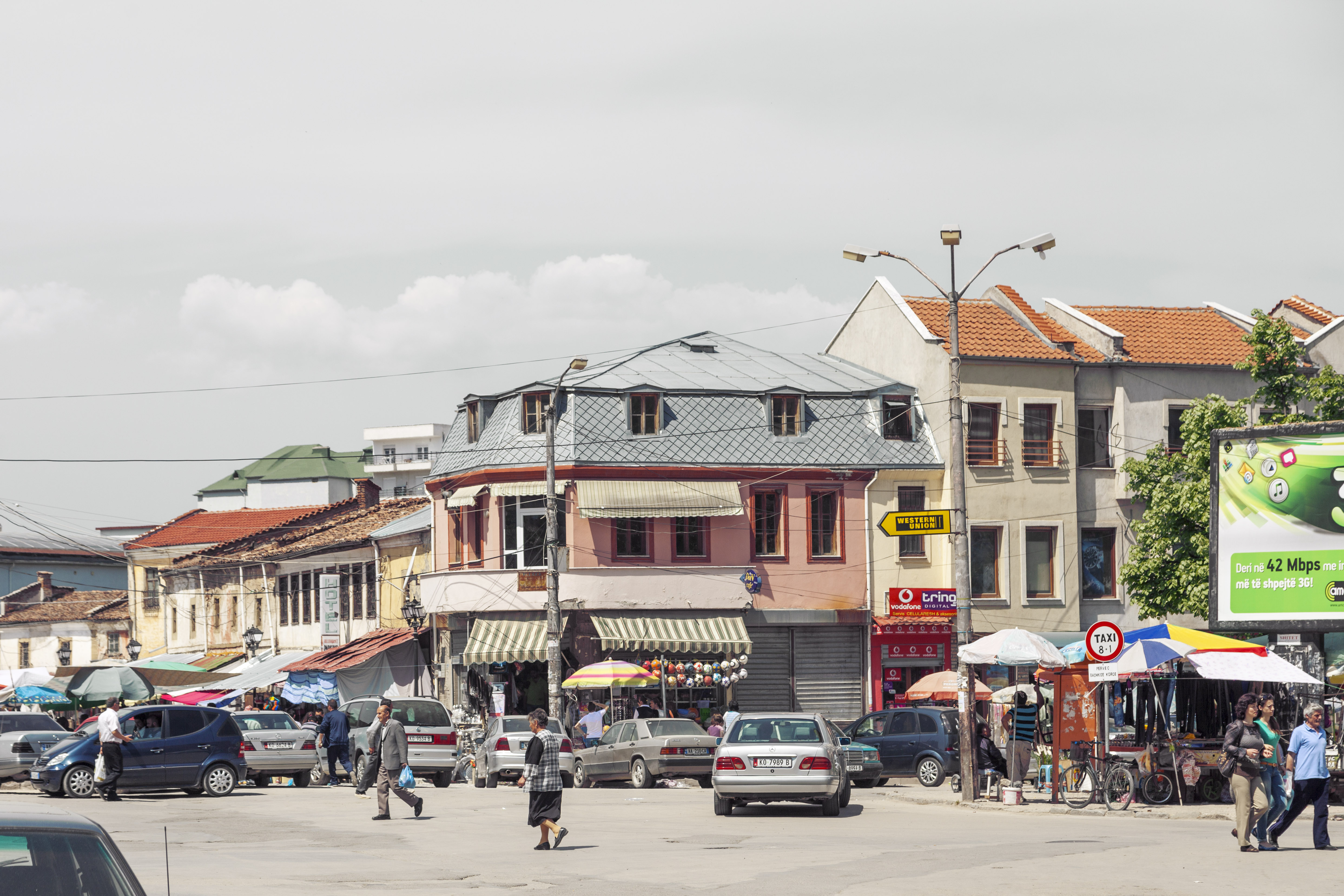 Korçë, Albania